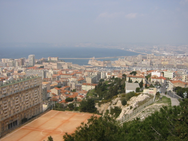 Marseille Panoramique vu sur vieux port depuis Notre Dame de la Garde